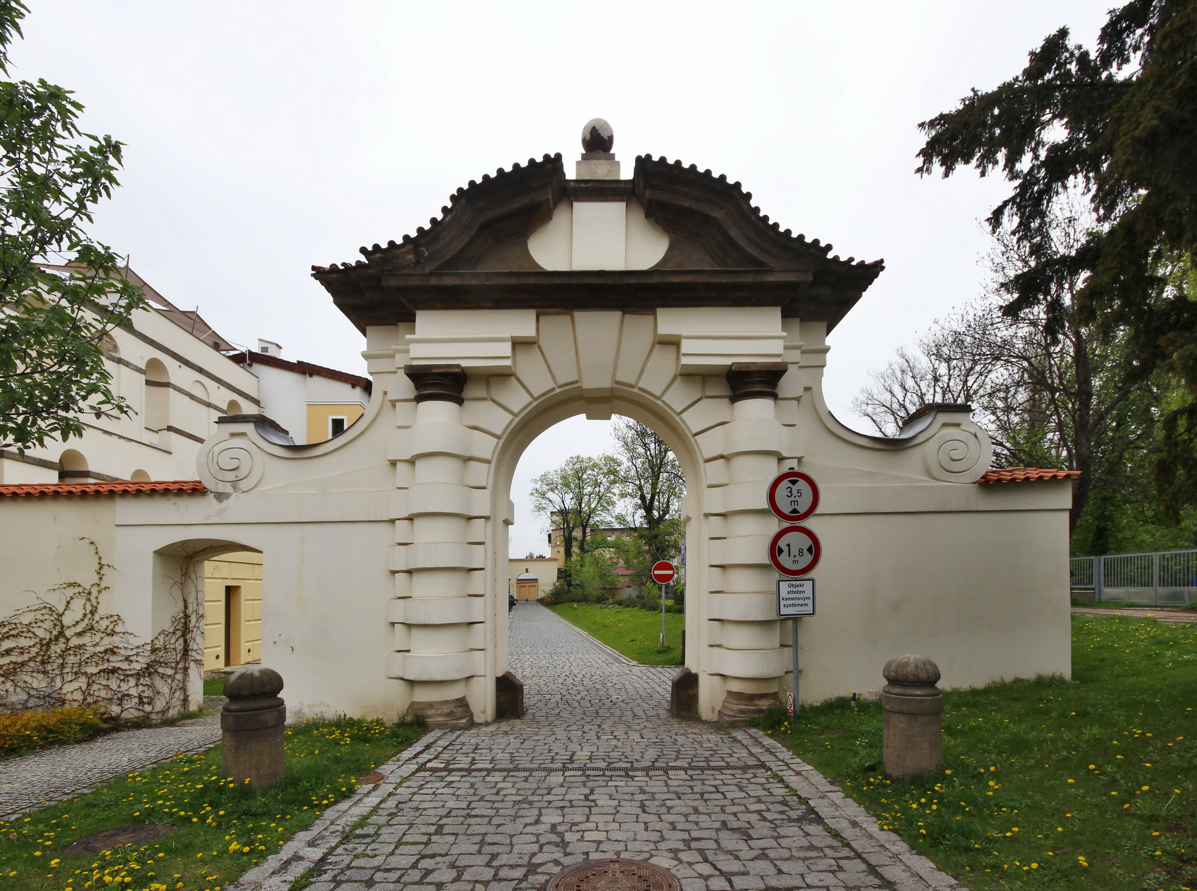 Praha 6-Bubeneč, Císařský mlýn